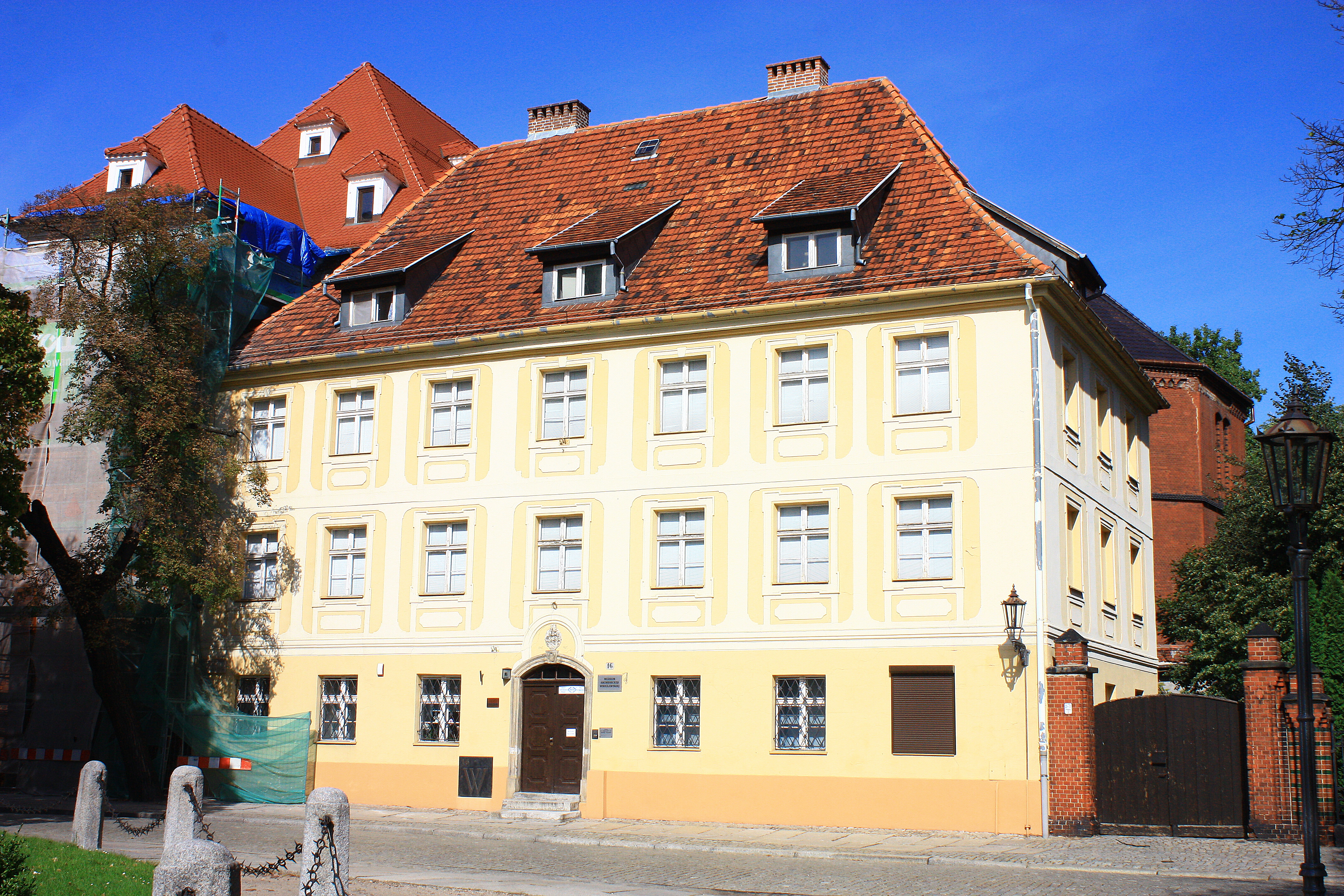 Wrocław, dom kapituły, poł. XVIII